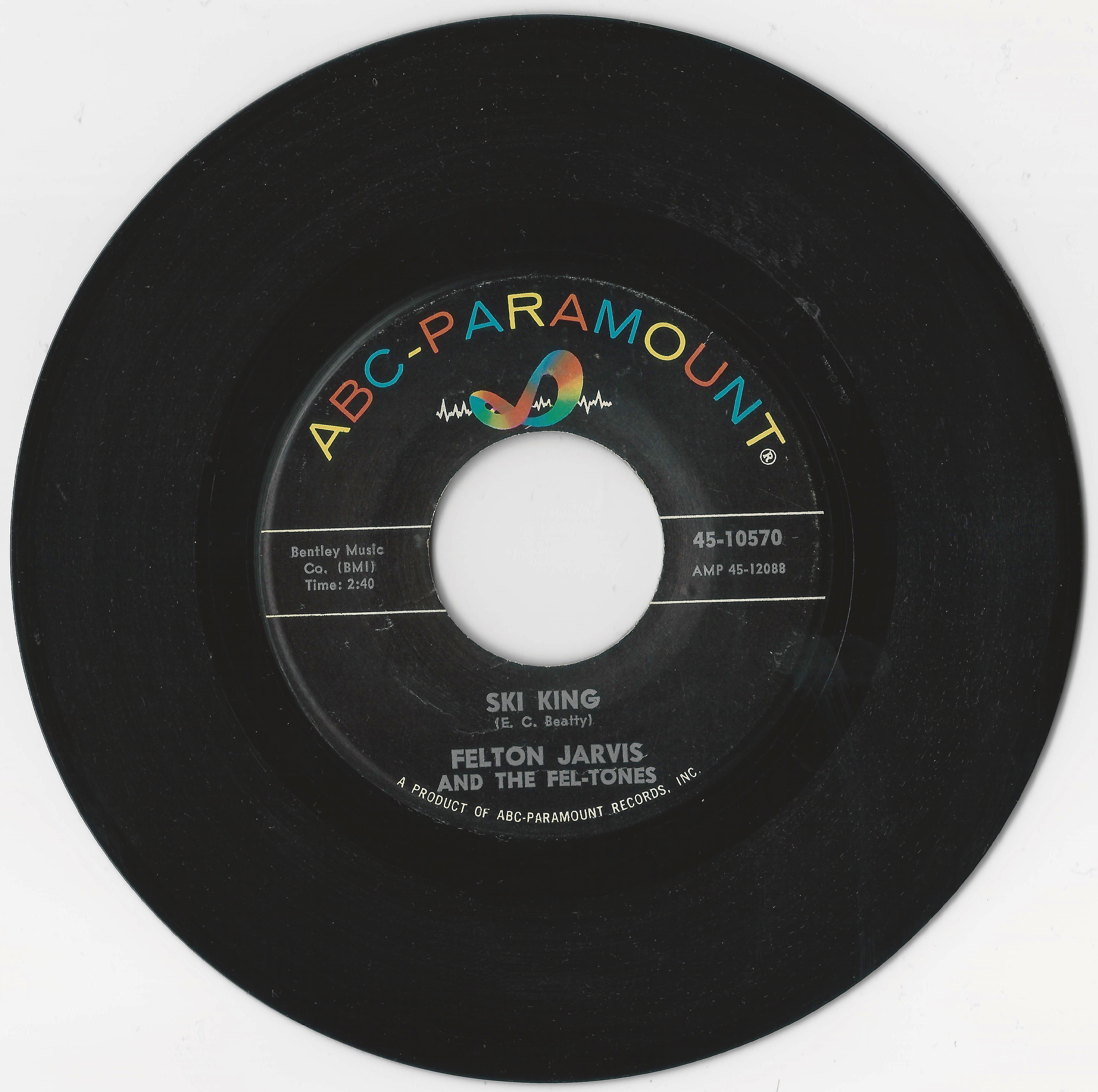 Ski King / Be-I-Bye, ETC (1964) Felton Jarvis and The Fel-Tones